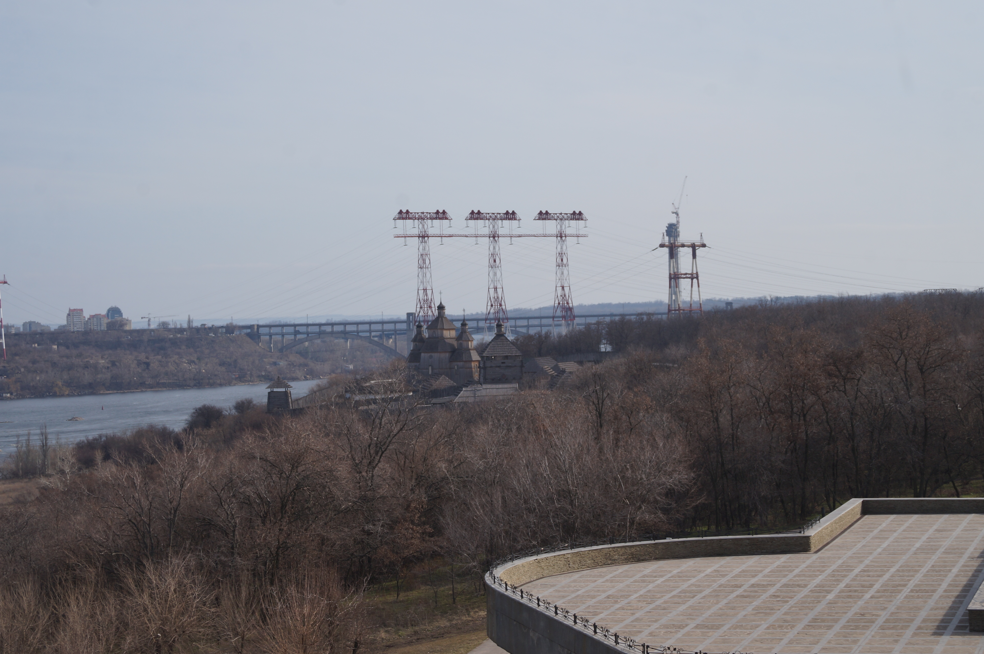 Національний заповідник «Хортиця», Запоріжжя, о. Хортиця